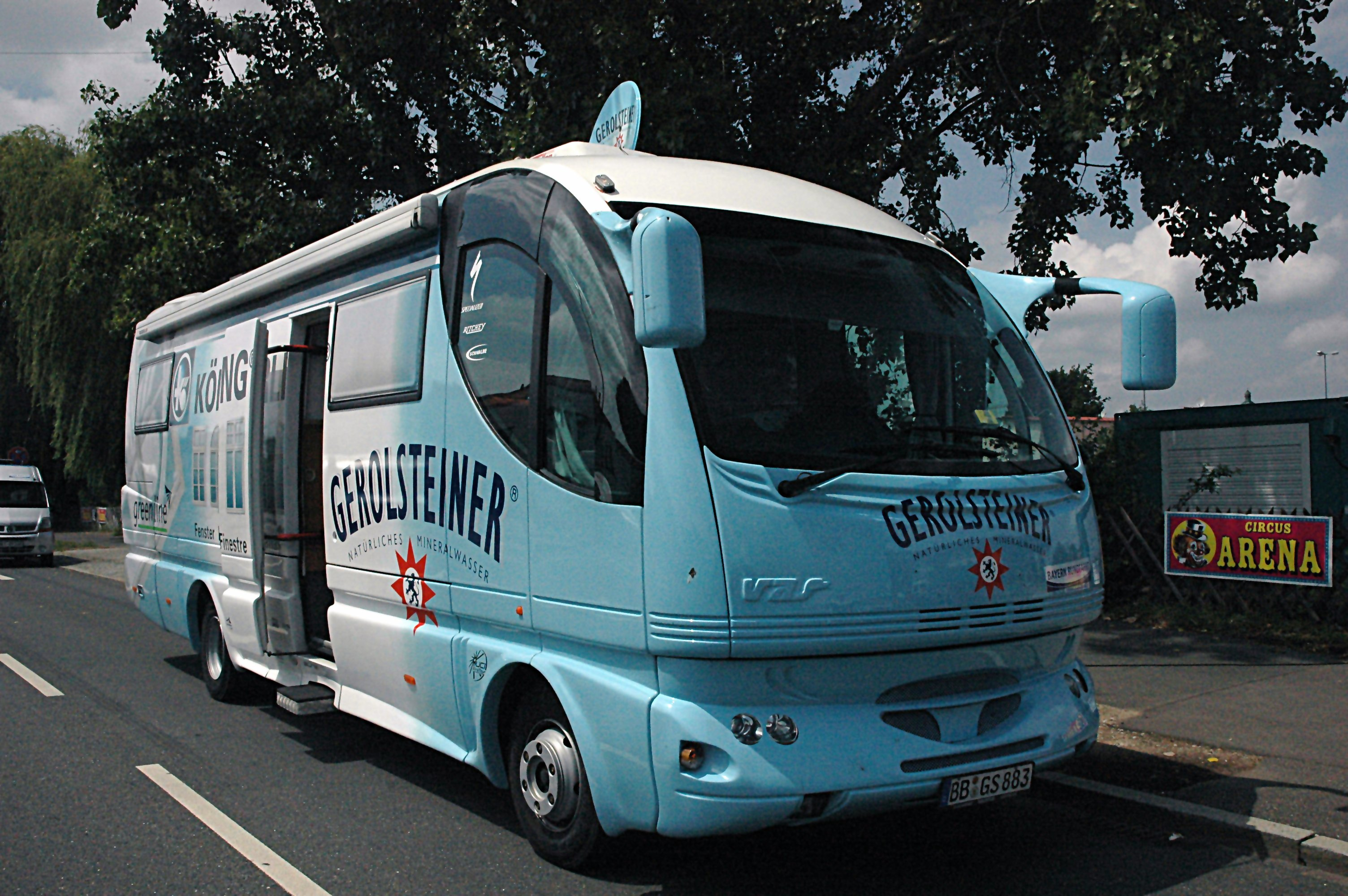 Der Teambus des Teams Gerolsteiner bei der Bayern-Rundfahrt 2007. Das Fahrzeug ist ein Vas Motorhome "Aster" auf MAN Chassis.